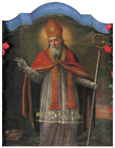 Абраз святога Мікалая. XVIII ст. Касцёл у вёсцы Геранёны. Іўеўскі раён